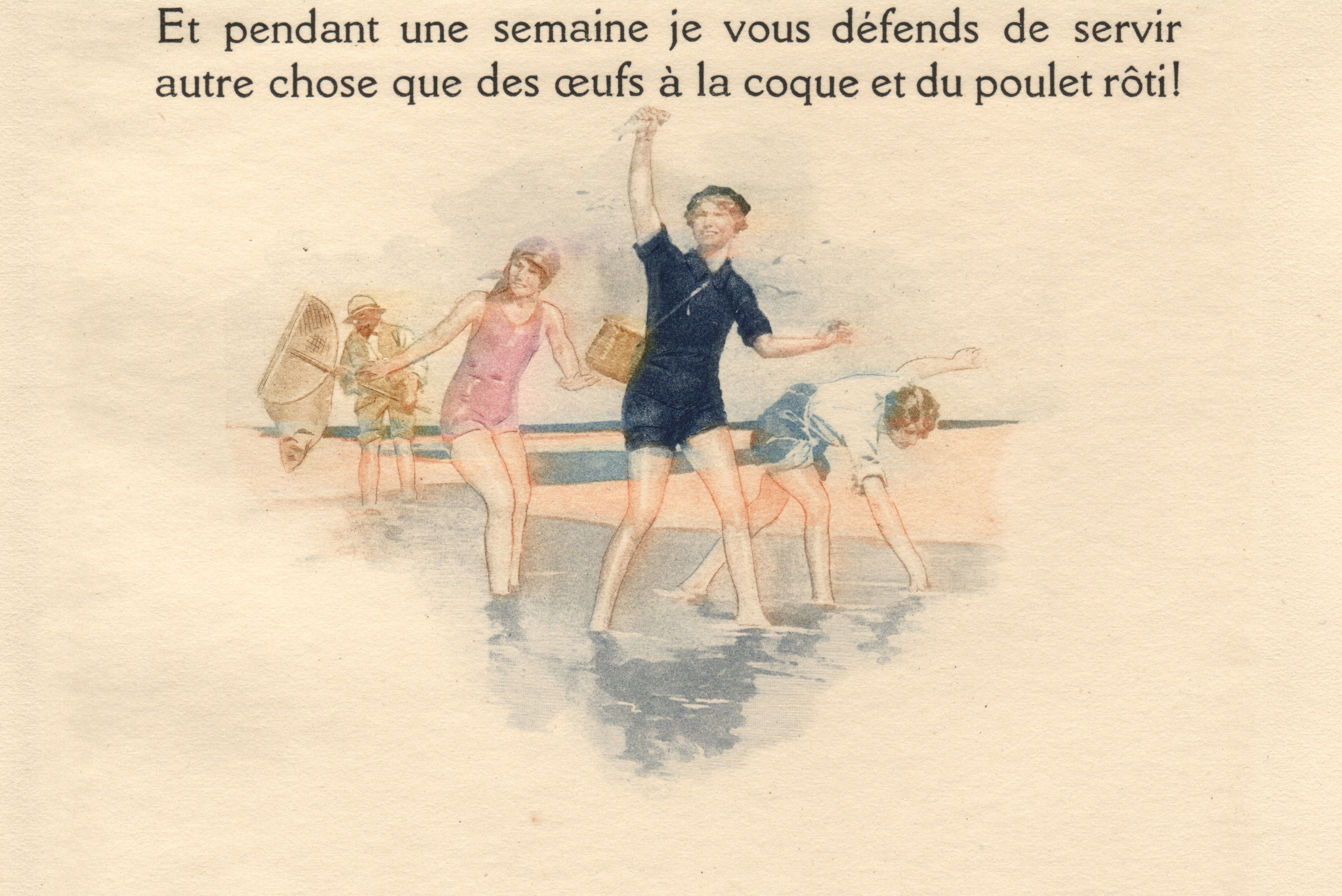 Illustration par René Lelong, page 149 du livre de Colette Les Vrilles de la vigne, en fin de la nouvelle Partie de pêche. Éditions Kra.